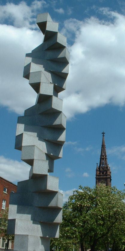 Endlose Treppe und Lutherturm in Ludwigshafen am Rhein